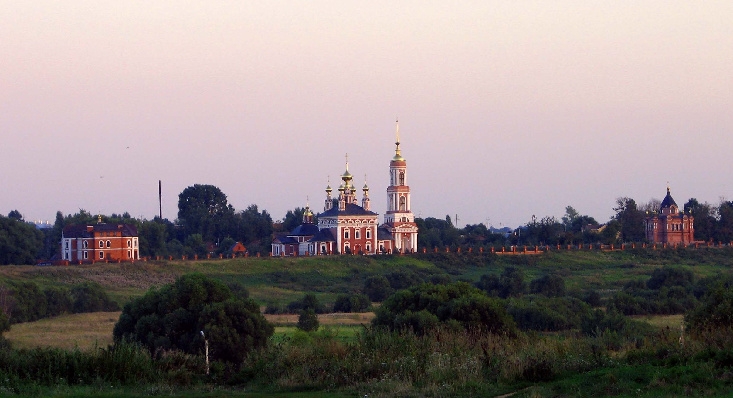 Церковь Архангела Михаила (Владимирская область, Суздаль, Михайловская улица (Михайловская Сторона))